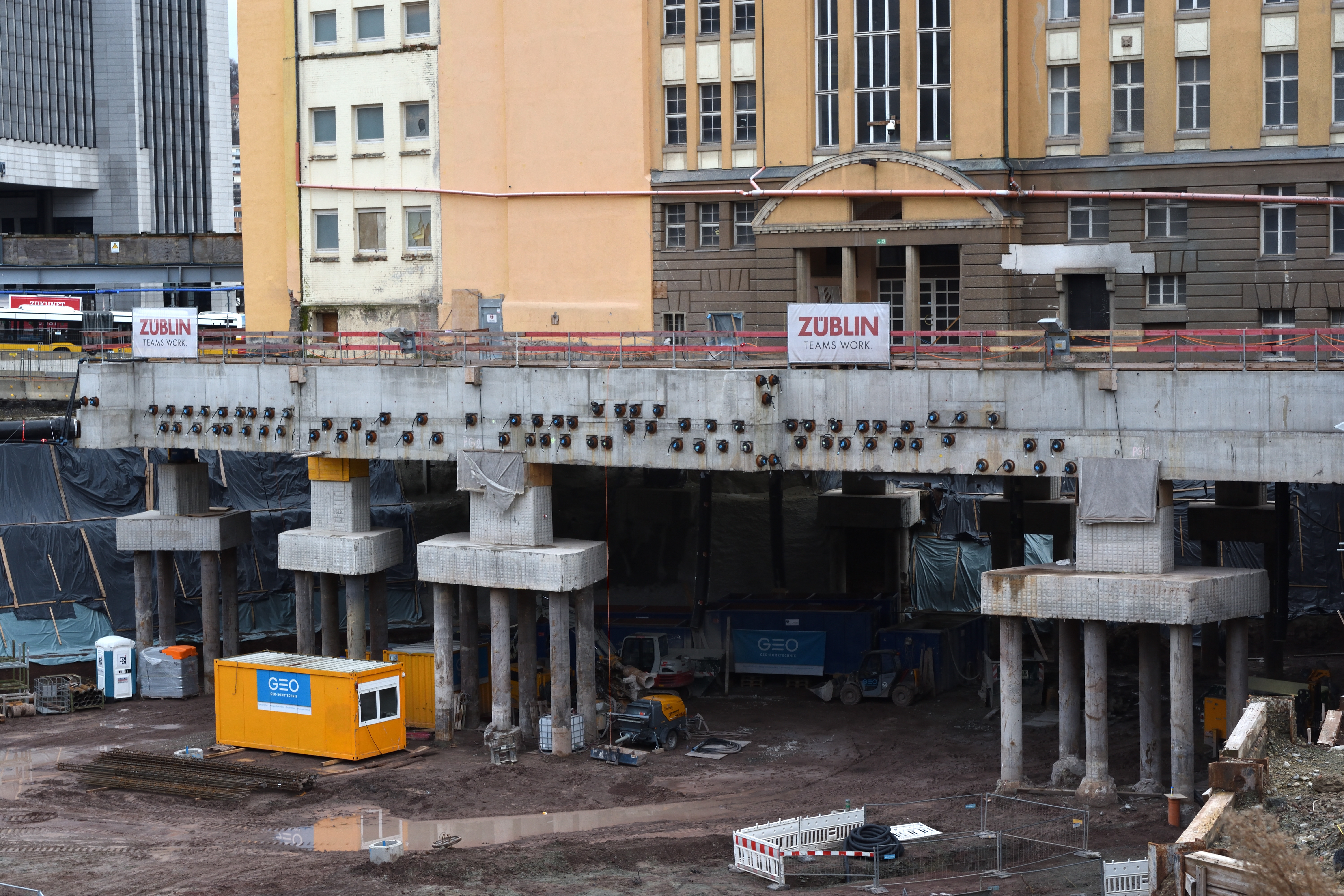 Stuttgart, die ehemalige Bahndirektion auf Pfeiler gesetzt, zwecks Untertunnelung des Gebäudes durch Stuttgart 21